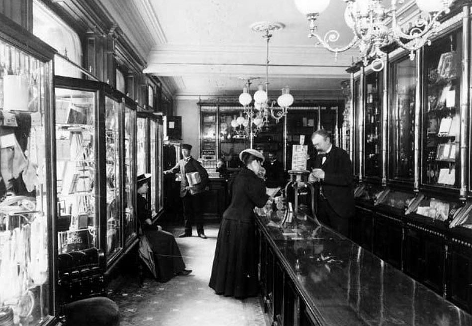 Numa Petersons affär på Hamngatan i Stockholm